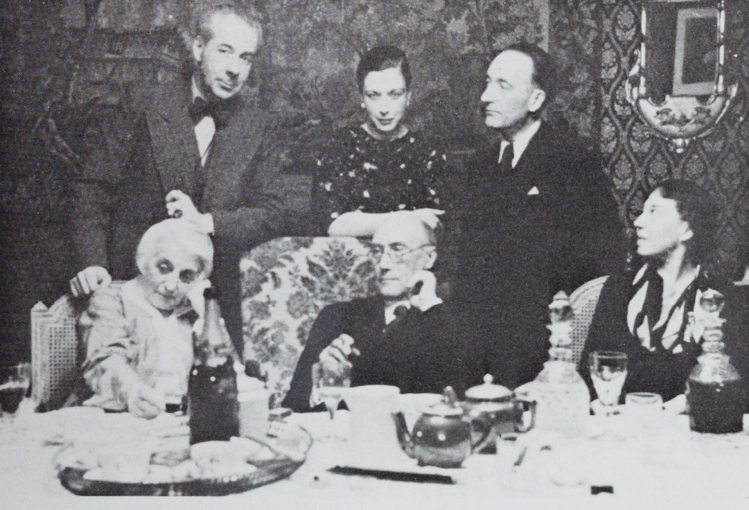 Debout: Roger Martin du Gard, Lise et Jules Romains; assis: Maria van Rysselberghe ("la Petite Dame"), André Gide et Madame Roger Martin du Gard. Nice, dîner chez les Jules Romains, 27 avril 1936.